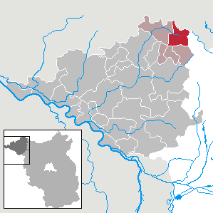 Meyenburg in Brandenburg (Country) - District Prignitz